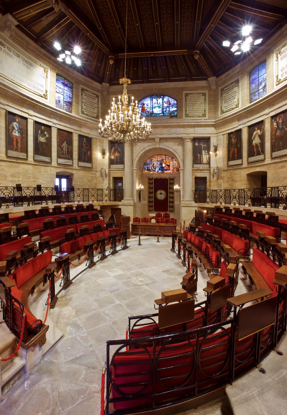 Gernikako Batzarretxeko batzar gela